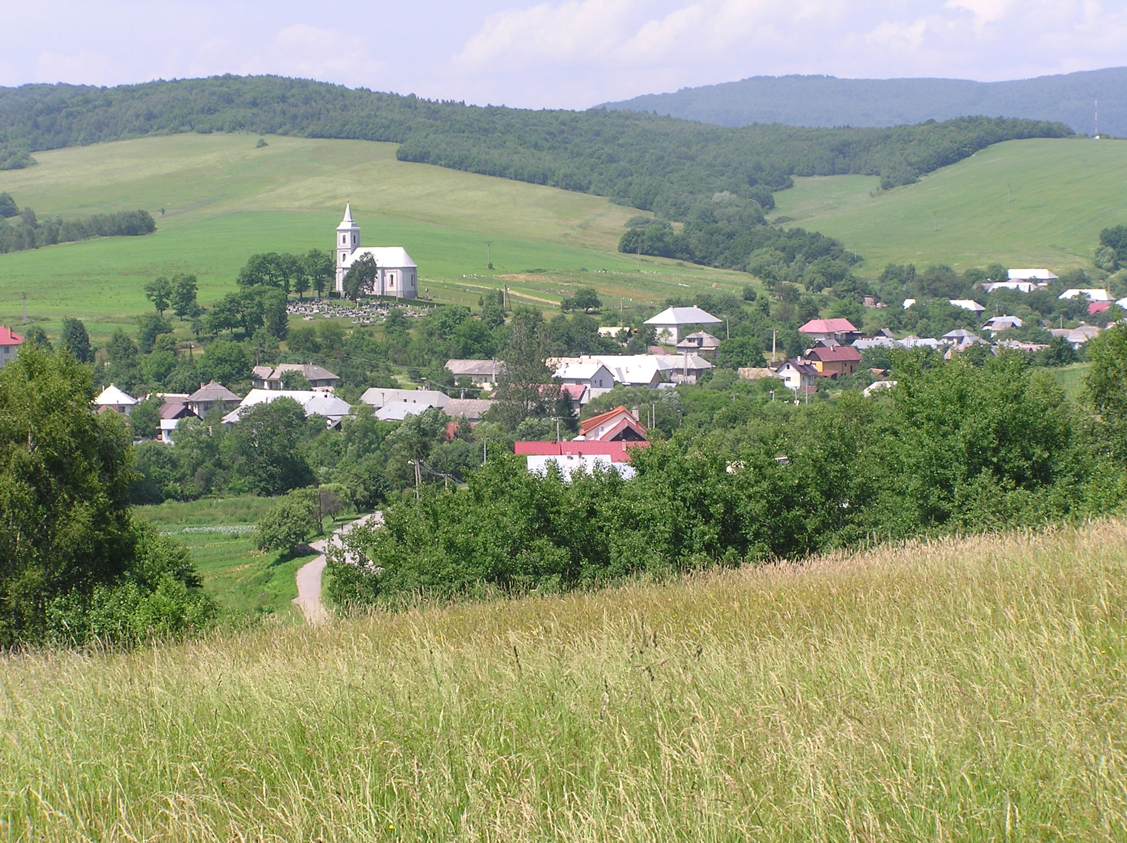 Celkový pohľad na Mlynárovce